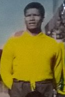 Wálter Ormeño, arquero de Rosario Central en 1956.